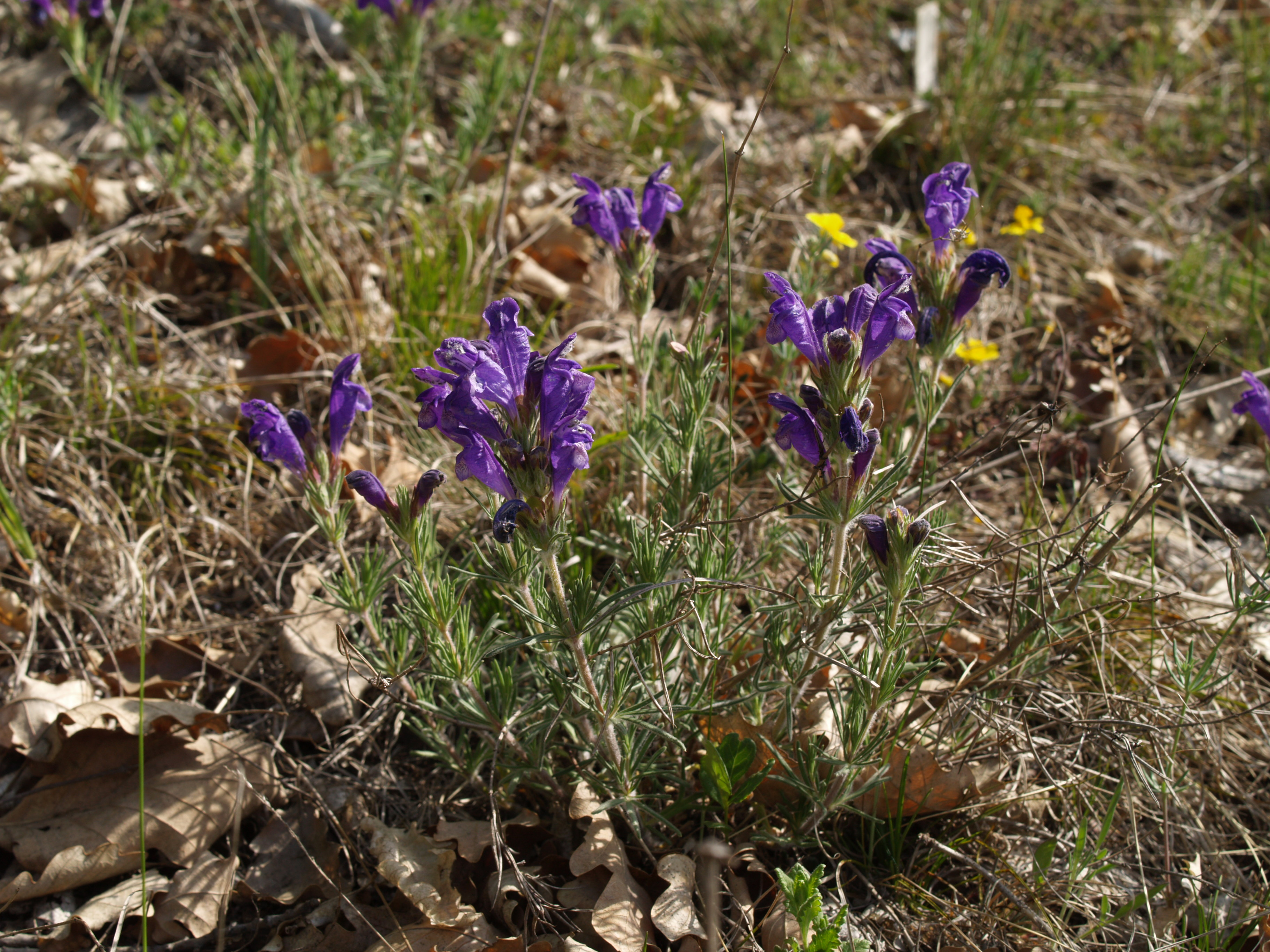 Koda (národní přírodní rezervace) - Dracocephalum austriacum L., včelník rakouský - status ohrožení v ČR: C1 (kriticky ohrožený)